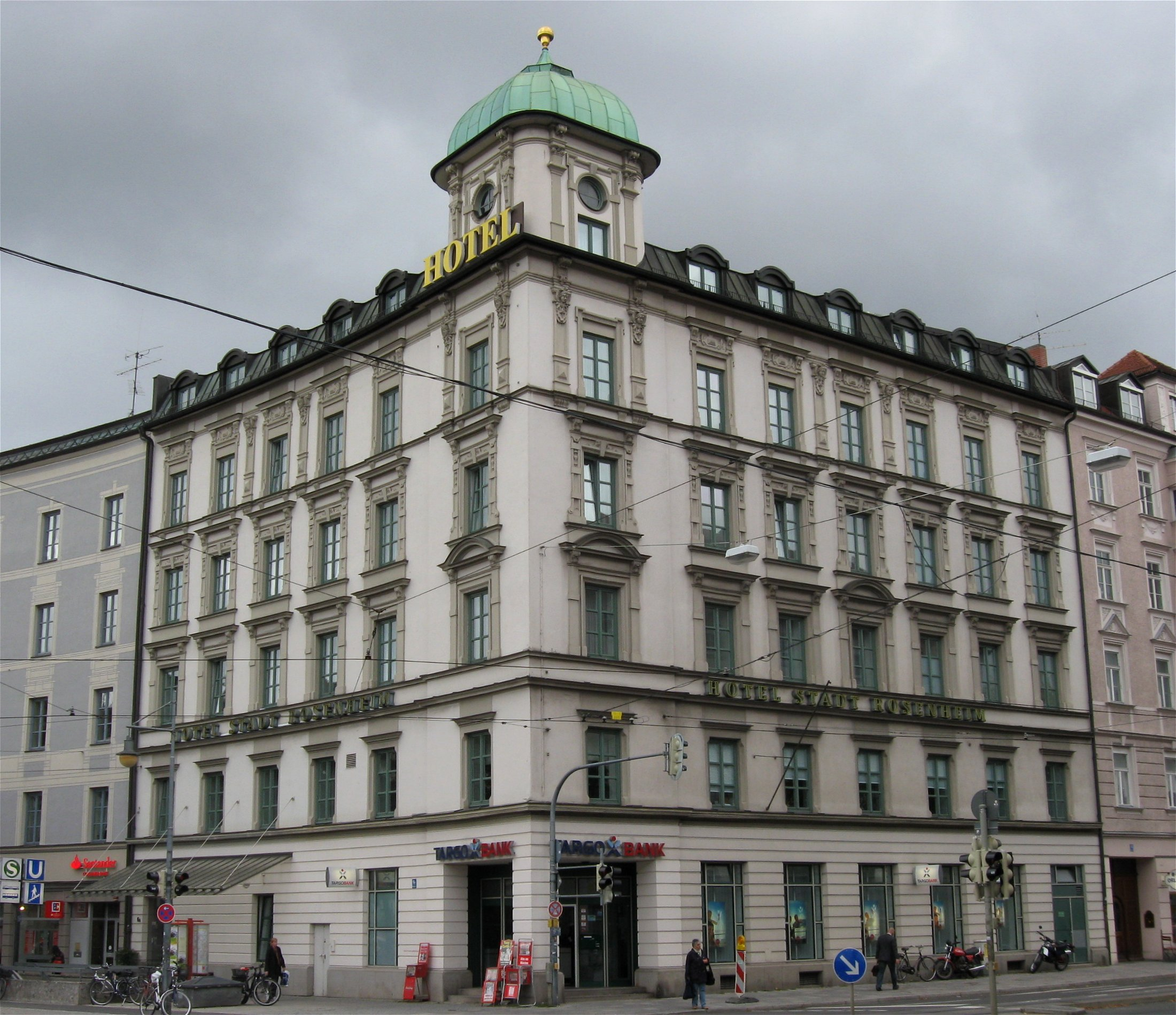 Orleansplatz 6 a; Hotel Stadt Rosenheim, Neurenaissance-Eckhaus mit Turm, reich dekoriert, 1890 von Emil Ludwig.